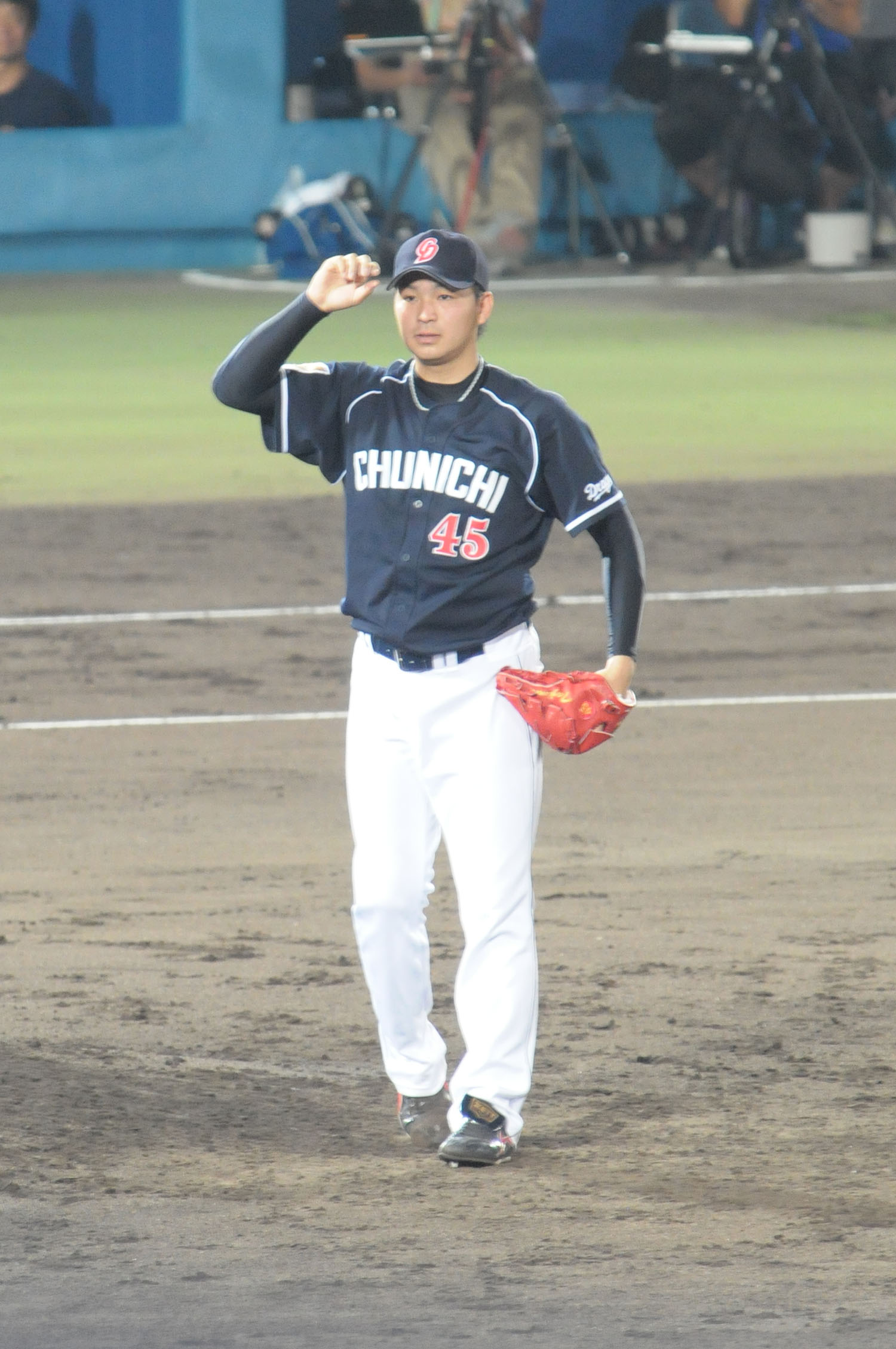 中日ドラゴンズ、田島慎二選手。こまちスタジアムで。